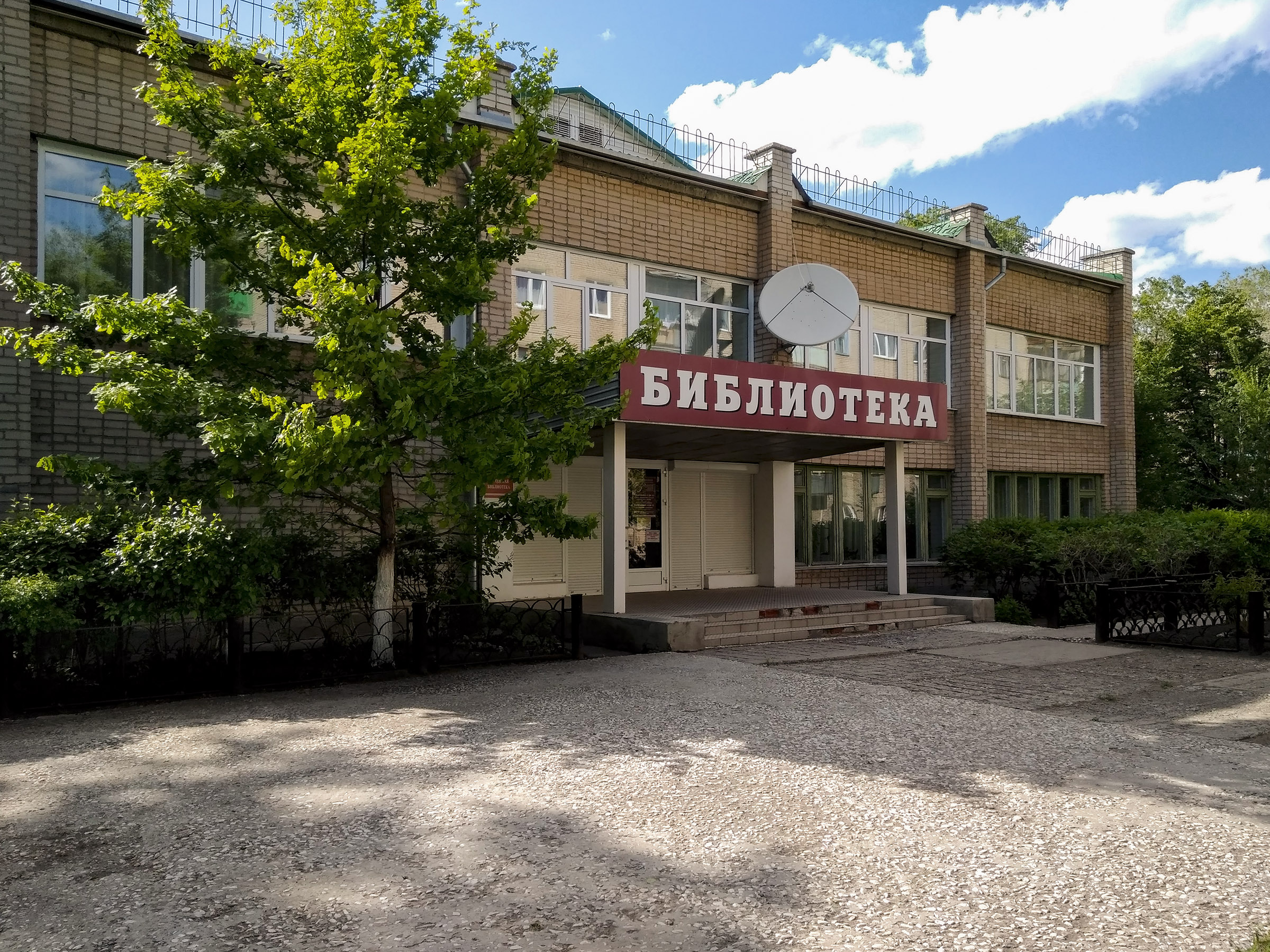 Городская библиотека, г.Южноуральск, Челябинская обл.